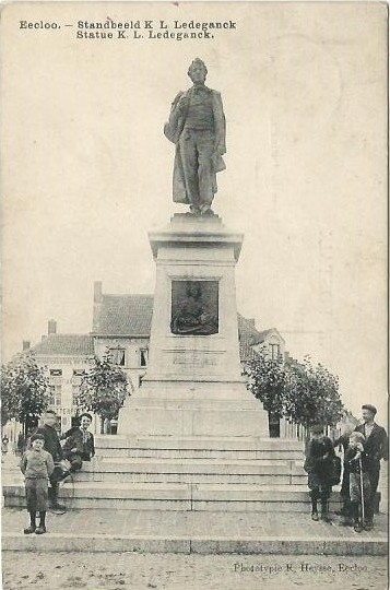 Statue de Charles Louis Ledeganck à Eecklo (Belgique). Ouevre de Jules Lagae.